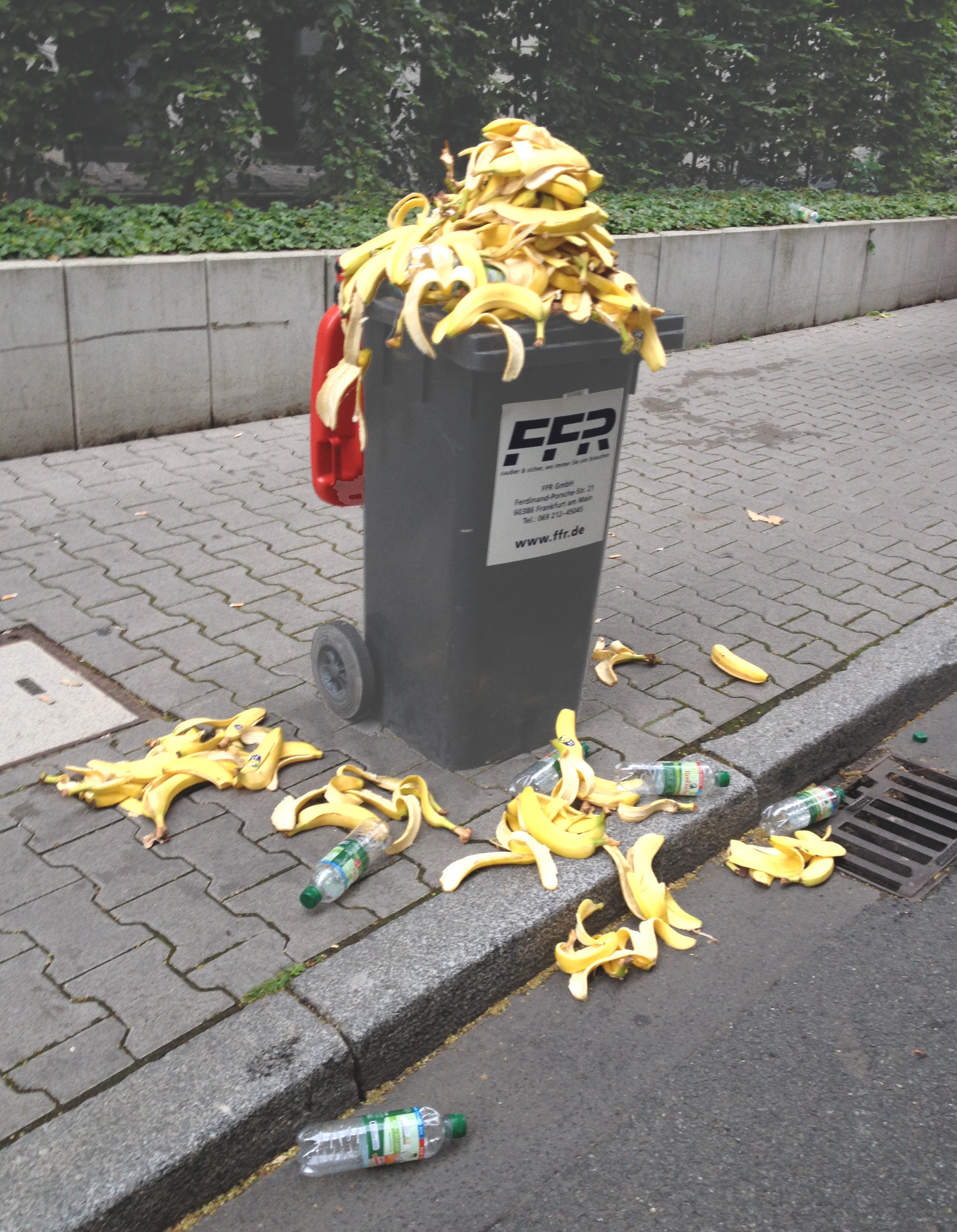 Bildinhalt: Graue Mülltonne übervoll mit Bananenschalen vom Challengelauf Aufnahmeort: Frankfurt am Main, Deutschland